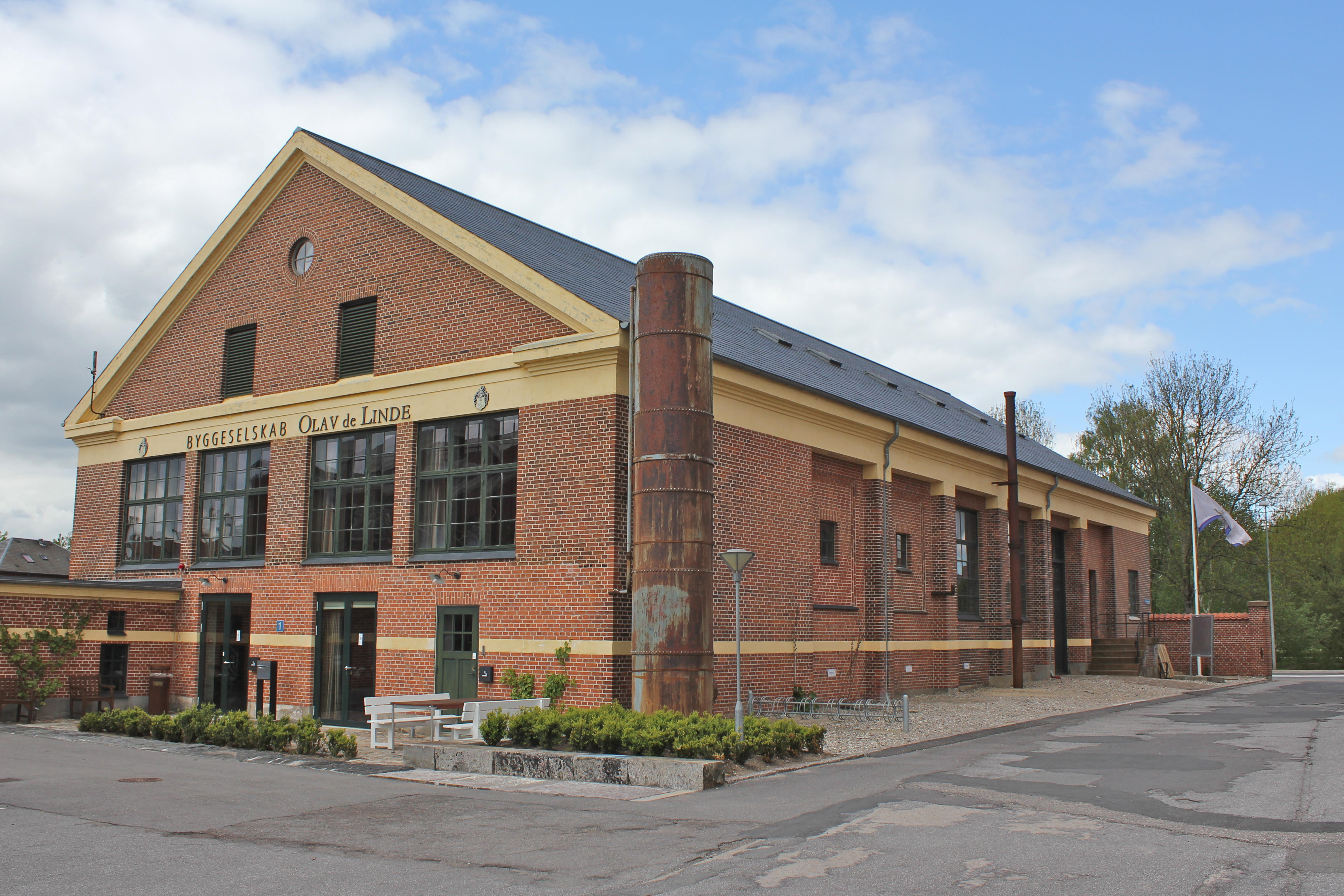 Thriges Kraftcentral i Odense